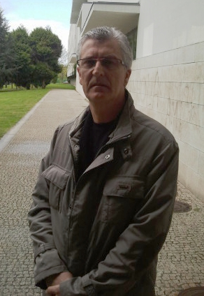 O actor galego Antonio Mourelos